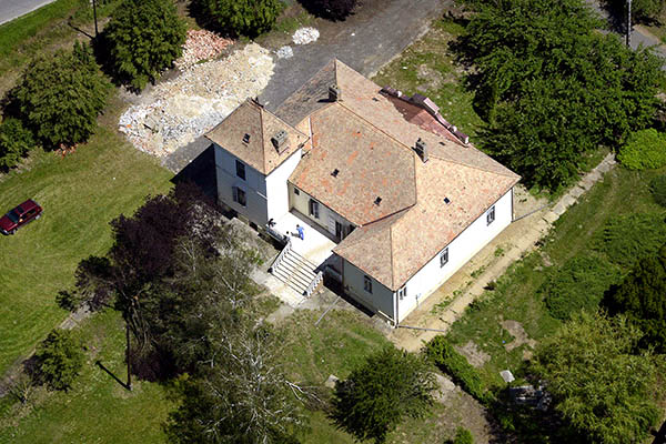 Légi fotó a vései Hencz-kastélyról